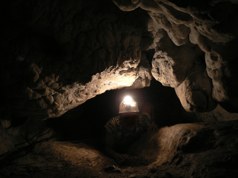 speleologo in un passaggio nella grotta della moneta. Autore